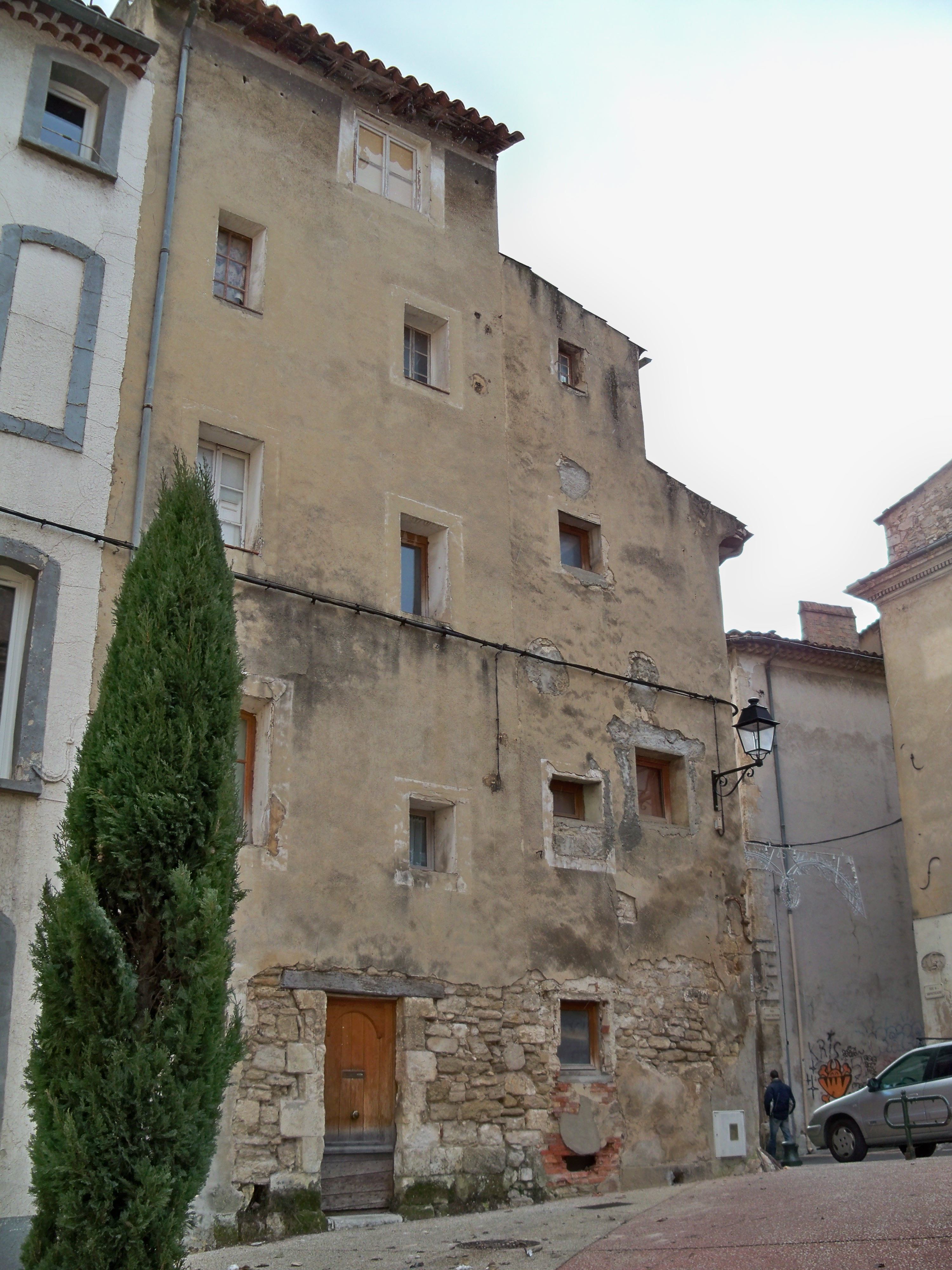 Maisons en hauteur à Apt (Vaucluse, France)